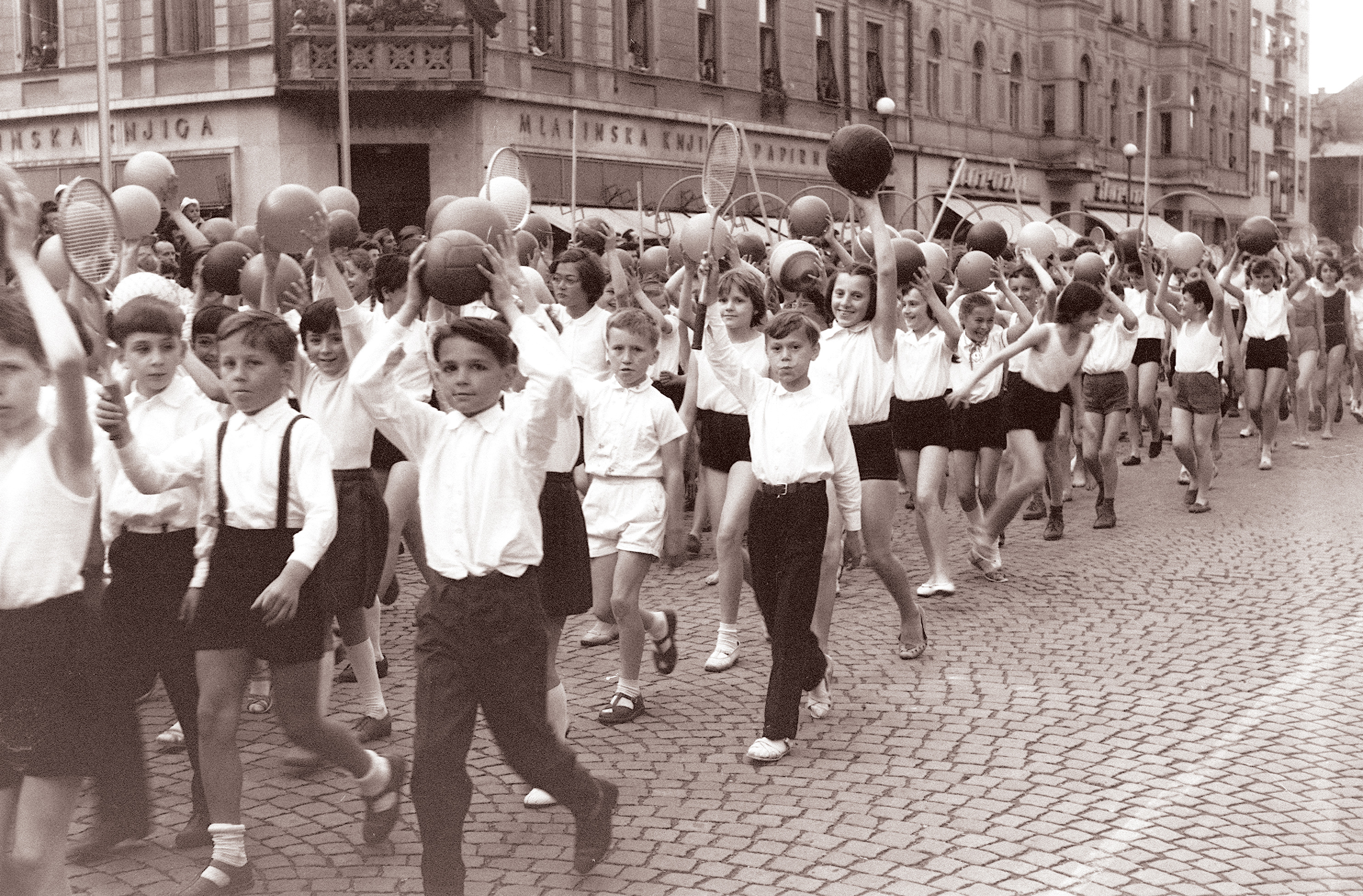 Dan mladosti v Mariboru